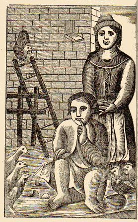 xylographie XIXe siècle